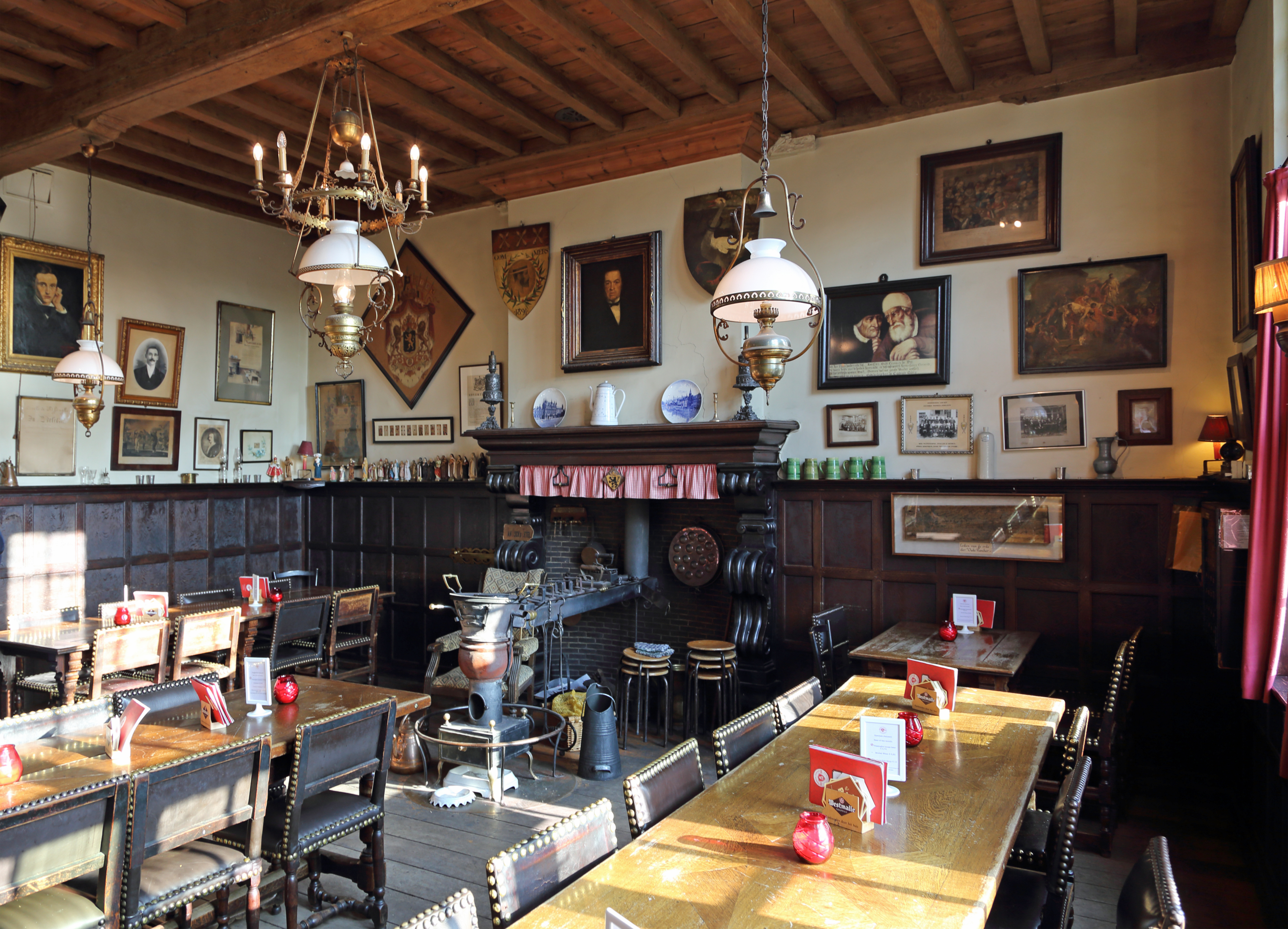 Brugge (België): café Vlissinghe, de gelagkamer